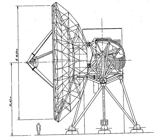 Plan Antenne Symphonie / Pleumeur-Bodou /France